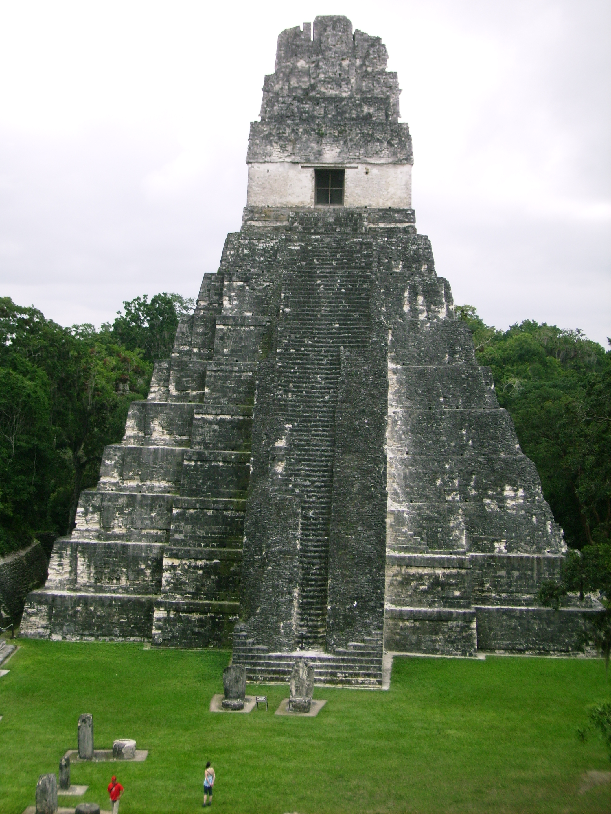 Tikal, Guatemal, Temple I